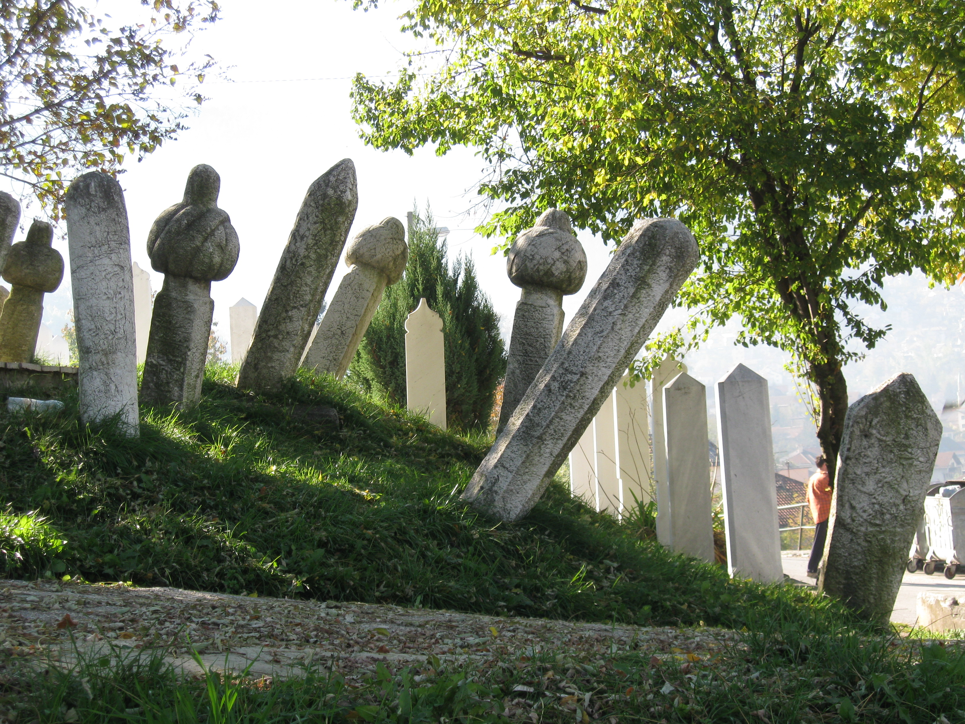 Sarajevo Okt. 2010 - Alifakovac